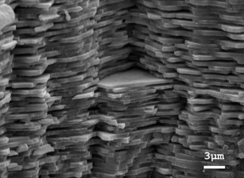 REM Aufnahme einer Perlmutt - Bruchfläche